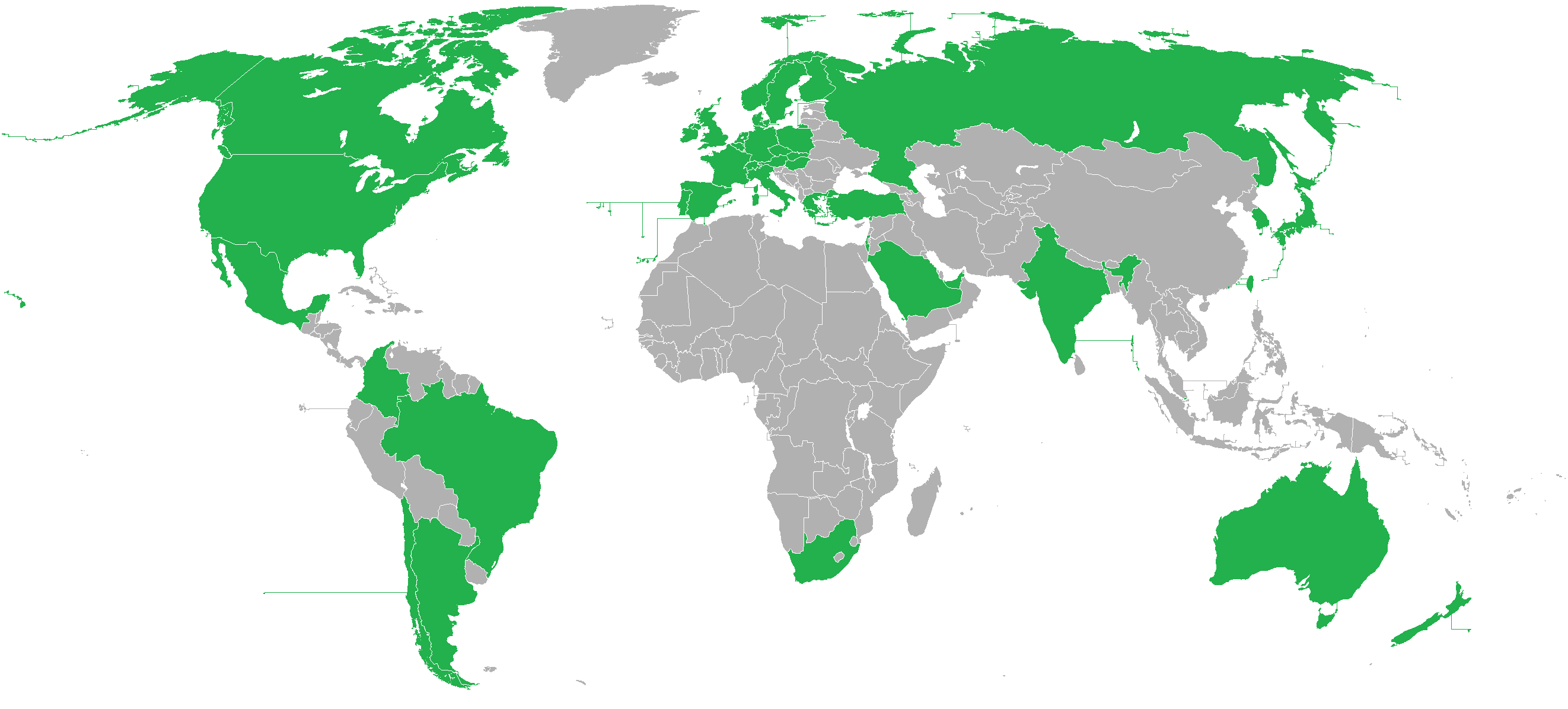 Planisferio donde hay disponibilidad del servicio de Xbox Live